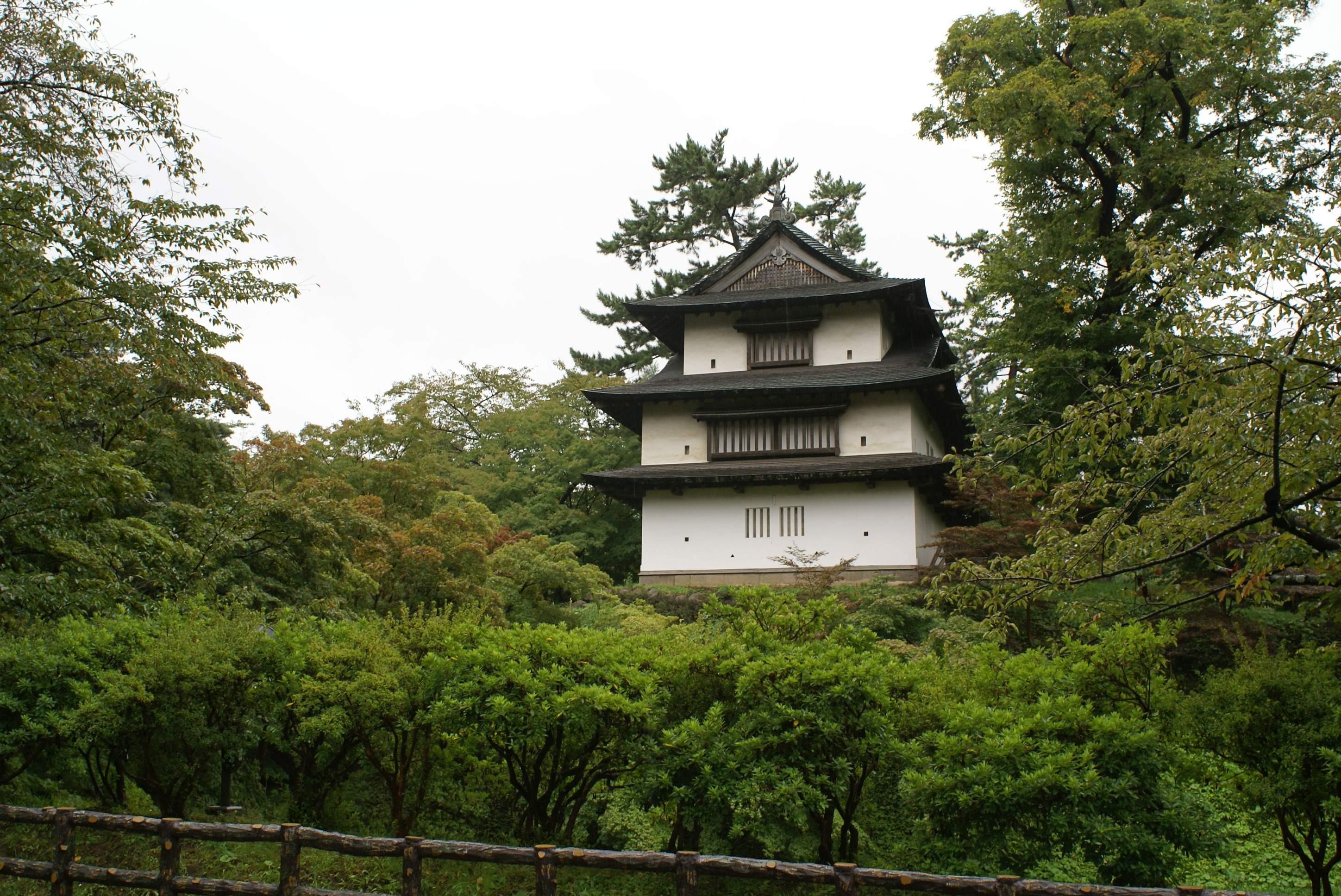 弘前城丑寅櫓